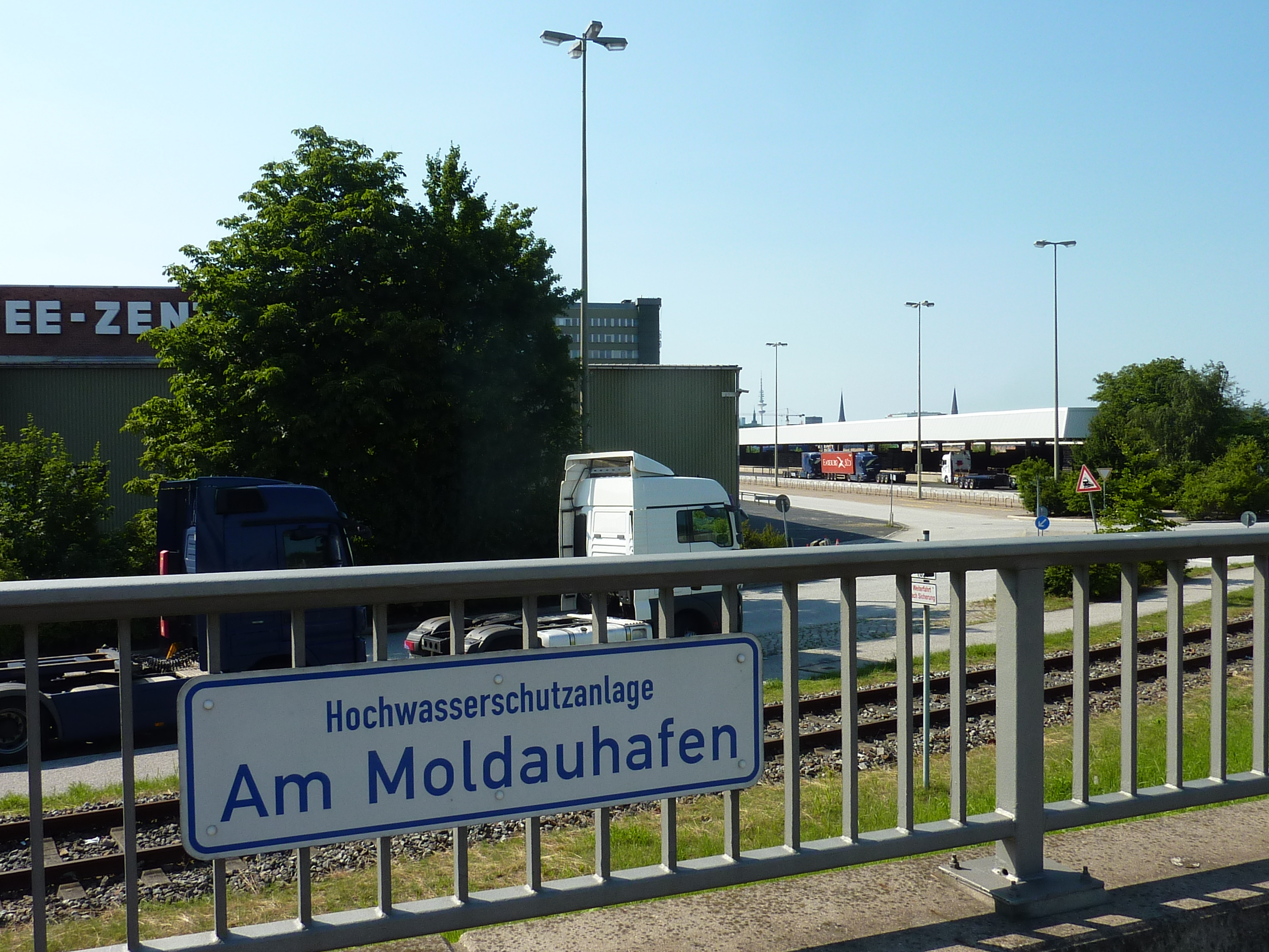 Moldauhafen in Hamburg, Schild der Hochwasserschutzanlage beim Prager Ufer am heutigen Übersee-Zentrum (2013)